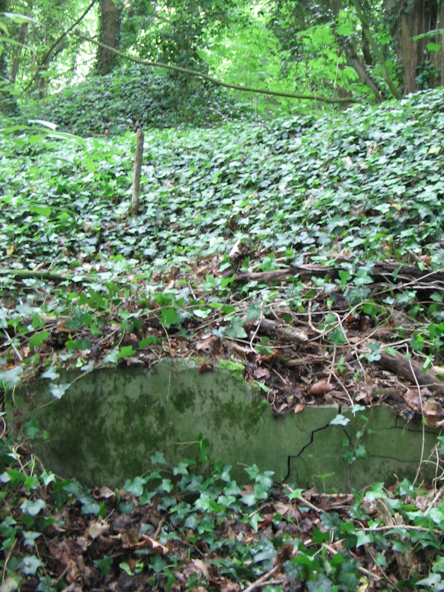 Restant Villa Bethula